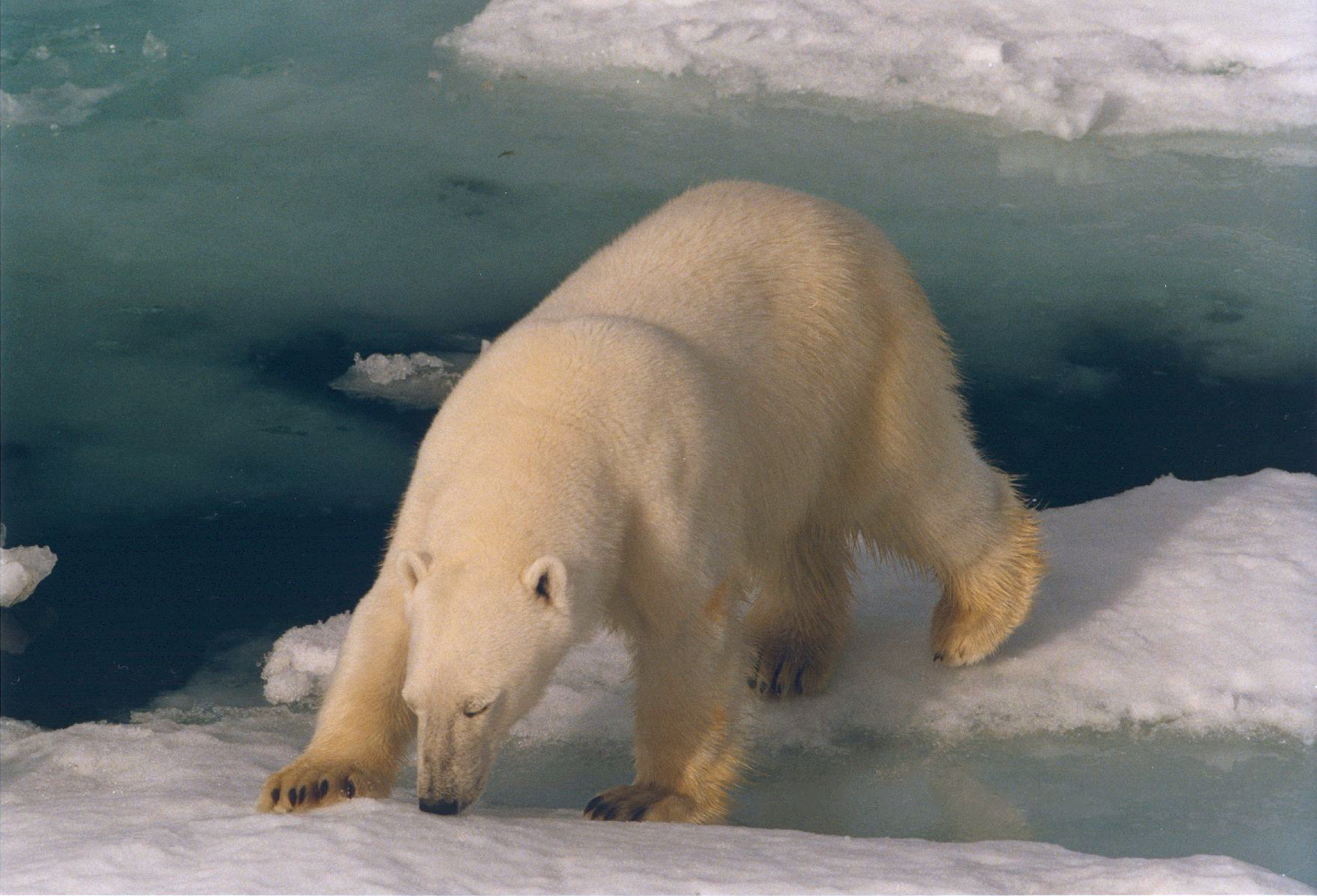 Svalbard IJsbeer close up